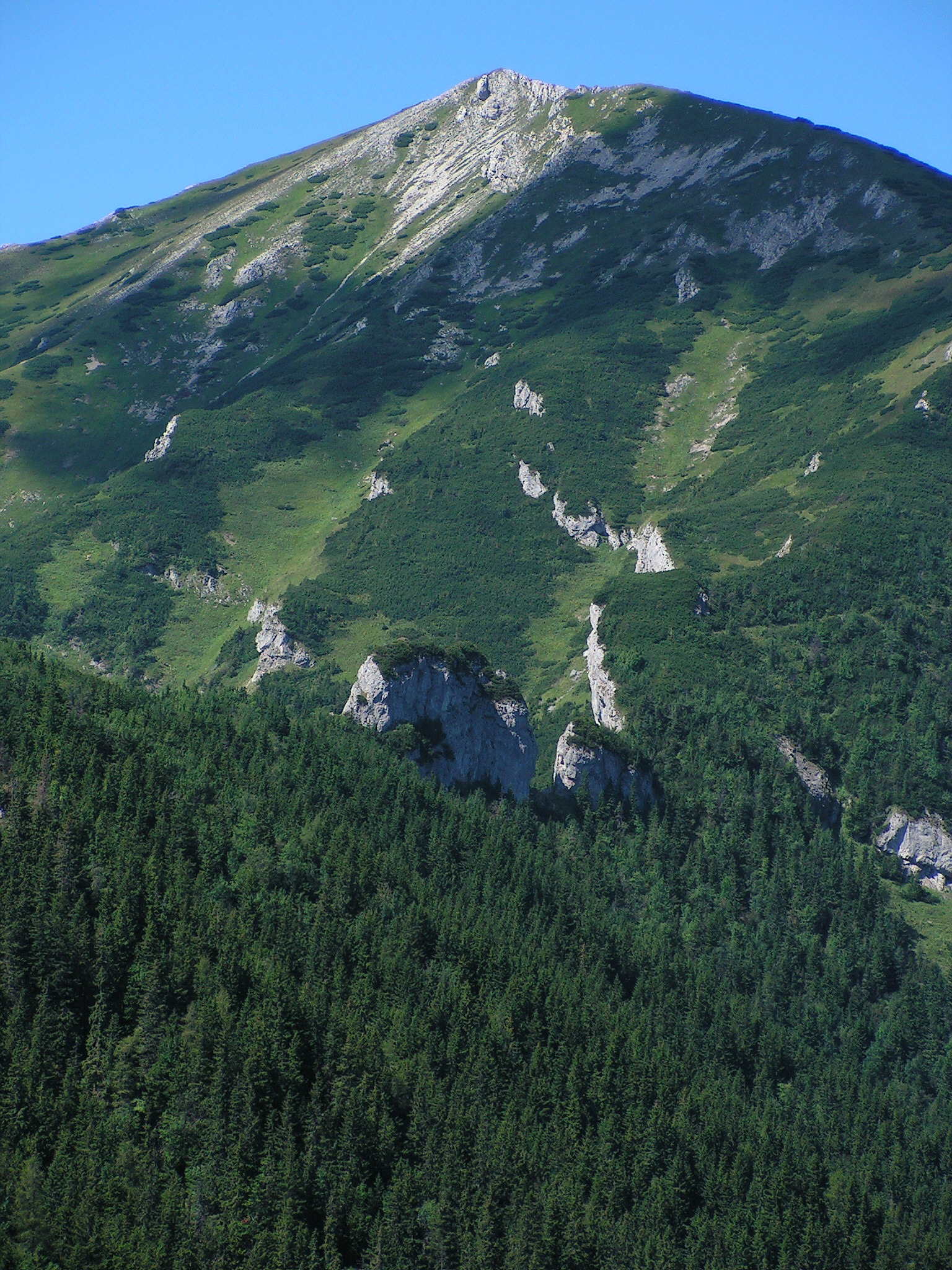 Bujaczy Wierch i Skalne Wrota z Fajksowej Czuby